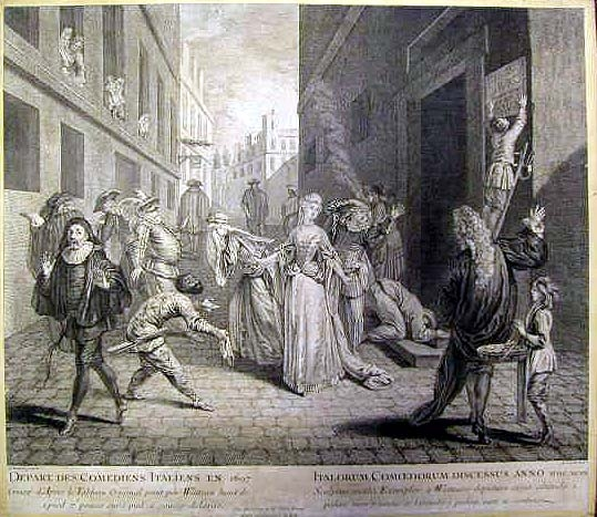 Départ des comédiens italiens en 1697, d'après le tableau original peint par Watteau, haut de 1 pied 7 pousse sur 1 pied 11 pousse de large, gravure de L. Jacob d'après Watteau. Collection privée